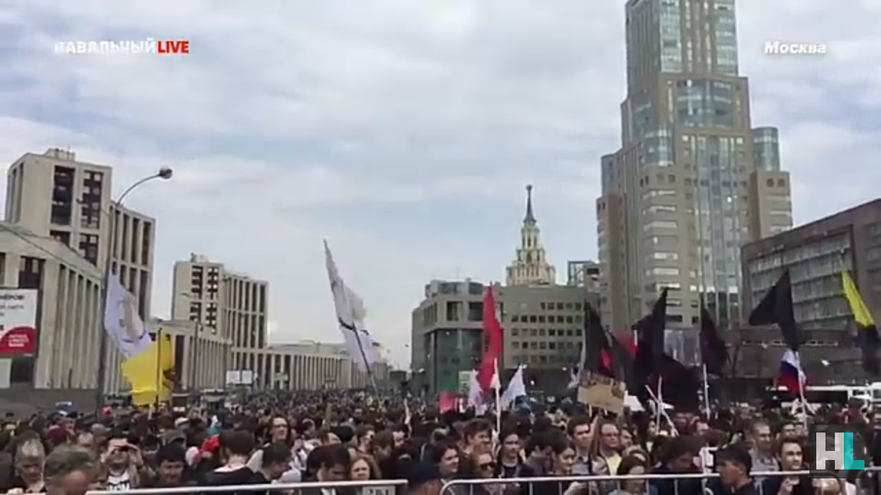 Митинг против блокировки Telegram в России. Москва, Сахарова